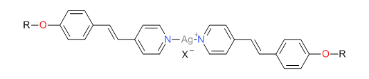 Métallogène : mésogène de cristaux liquides métallotropes.